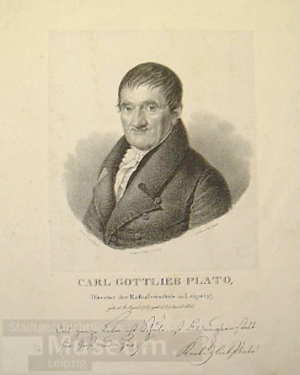 Carl Gottlieb Plato, Direktor der Ratsfreischule in Leipzig Autograph: Das ganze Leben ist Schule, ist Bildungsanstalt für Geist und Herz. Karl Gottlieb Plato